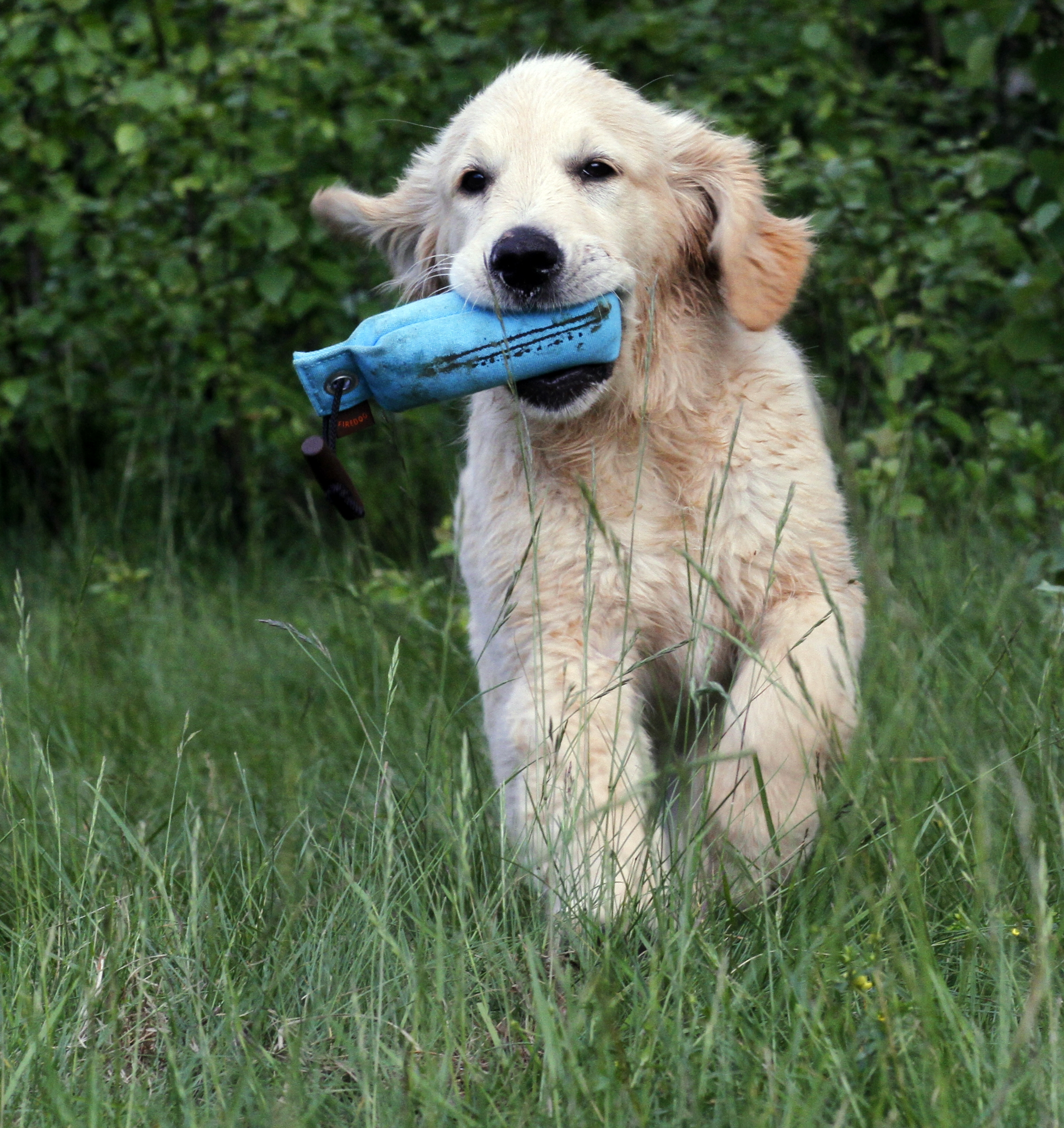 Golden valp apporeterer